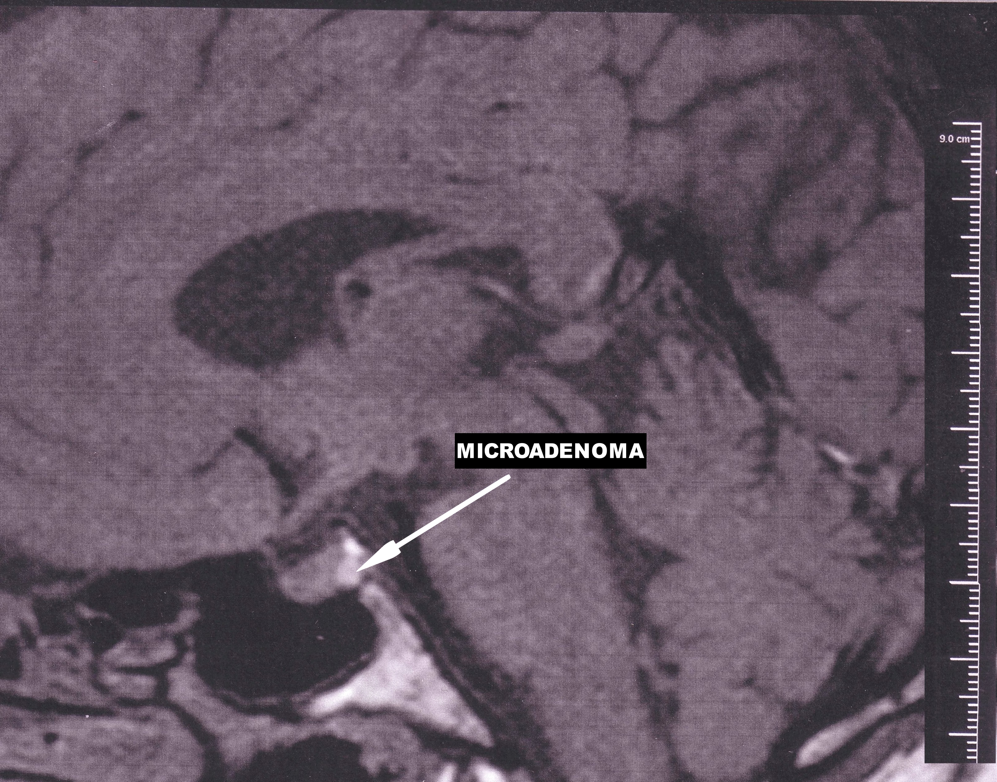 Resonancia mágnética nuclear de la cabeza, visión lateral. La flecha indica la posición de un microadenoma de hipófisis.